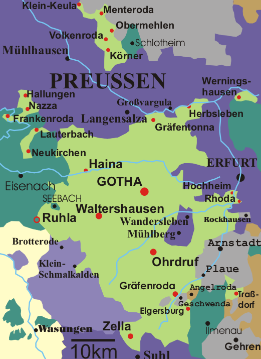 Karte des Herzogtum Sachsen-Gotha.